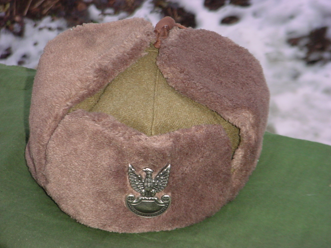 Беларуская (тарашкевіца): Польская вайсковая аблавушка з пэрыёду ПНР